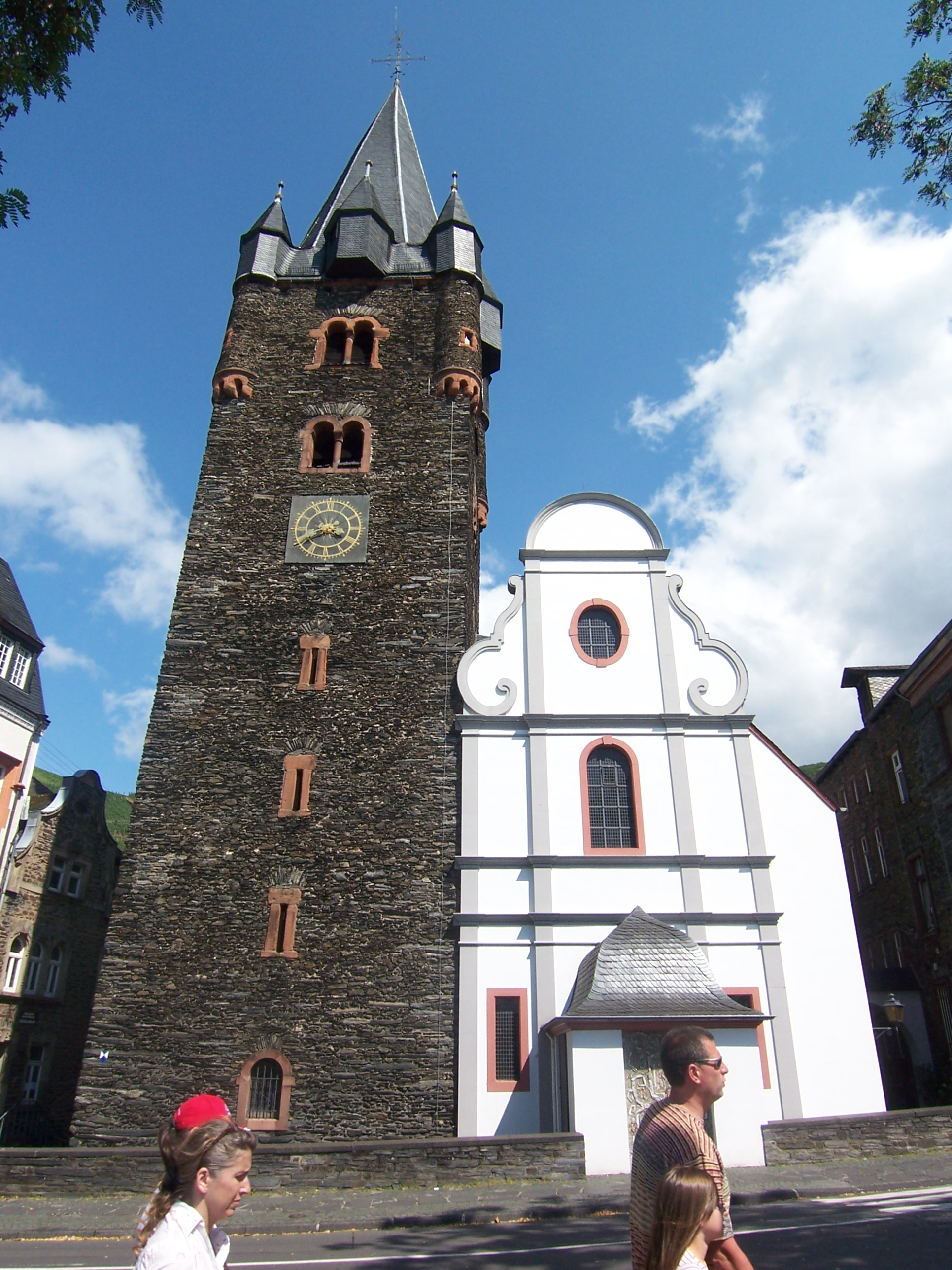 Bernkastel-Kues, Pfarrkirche St. Michael